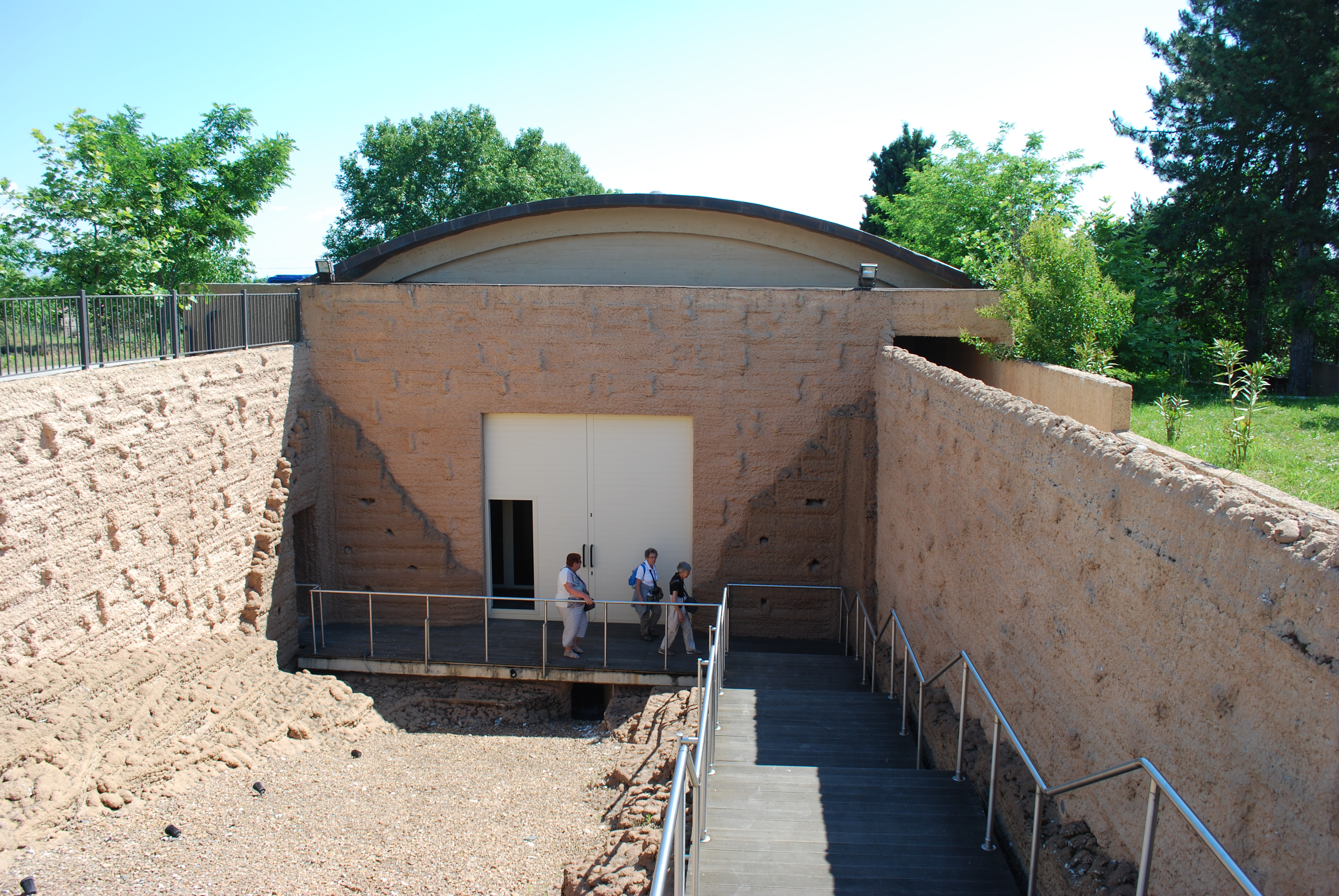 Vue des tombes macédoniennes de Mieza (Naousa).